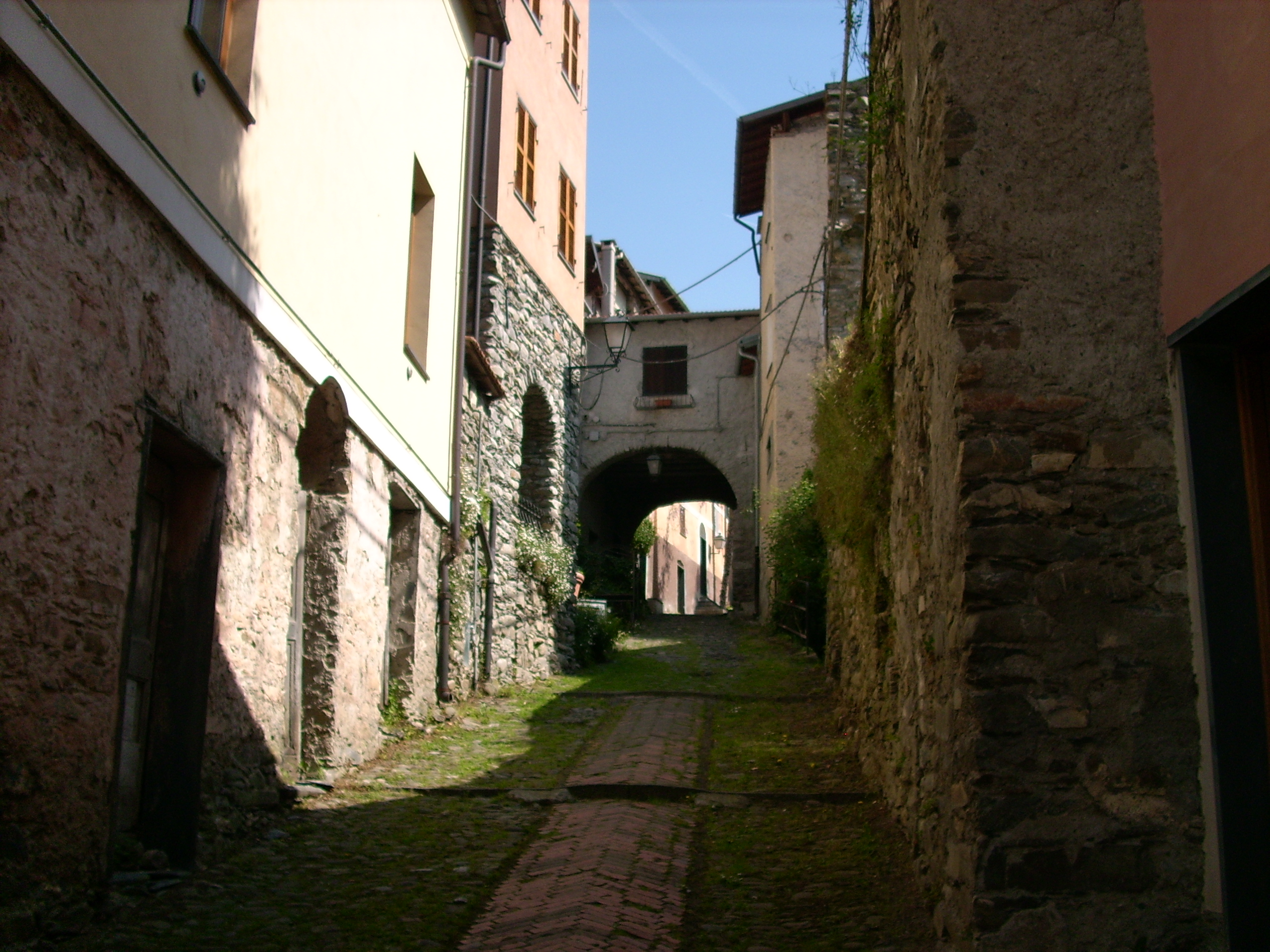 Molini di Triora, Liguria, Italia